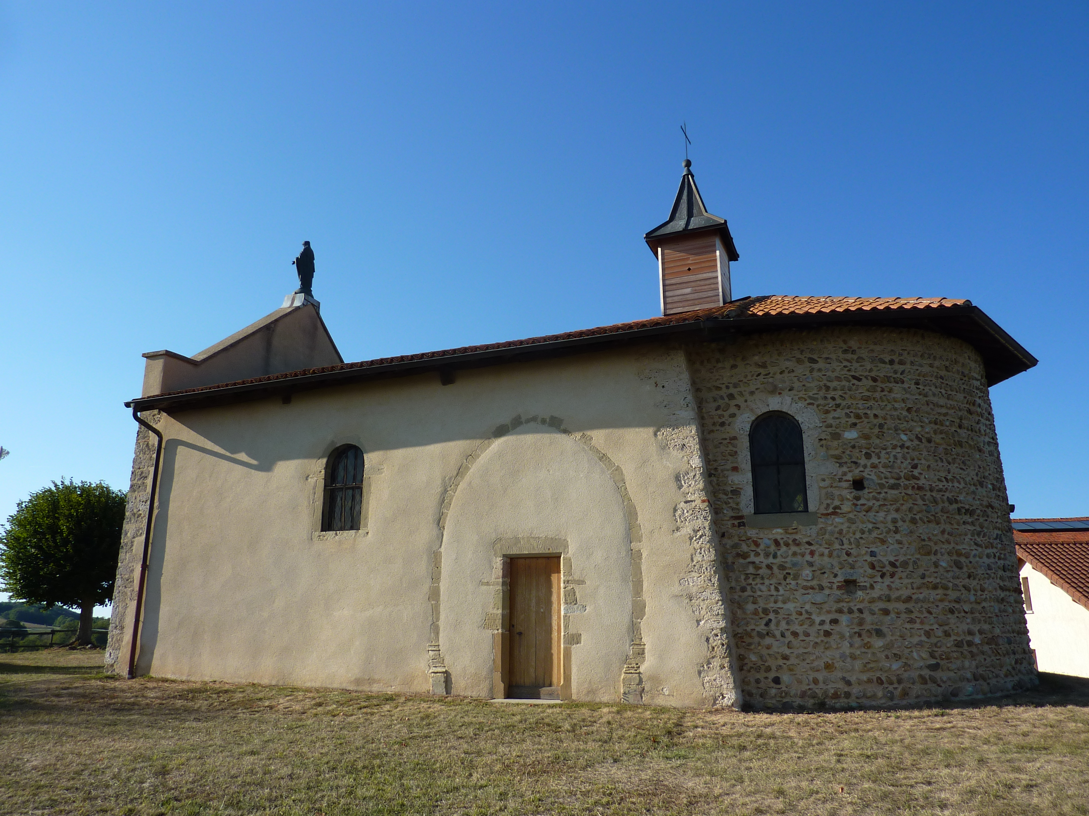 Chapelle Notre-Dame du Mont à Gillonay, Isère, France